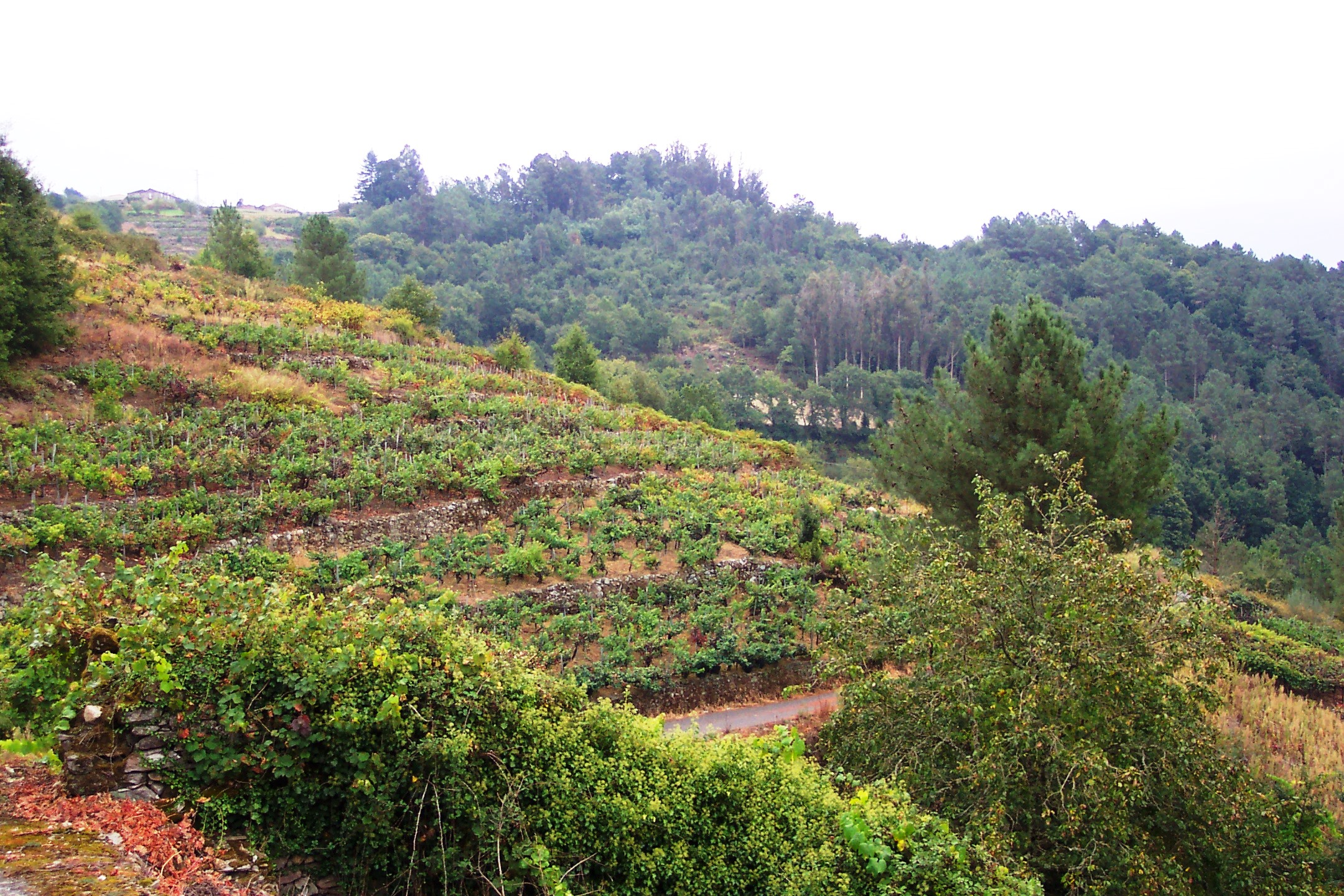 Oleiros, Carballedo